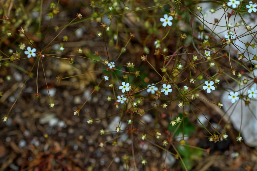 Alpengarten Villacher Alpe: Chaix-Mannsschild